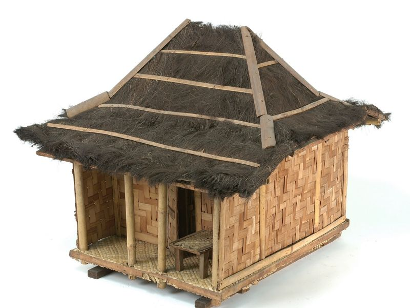 Huismodel. Model van een Javaans huis Unknown language: Limasan